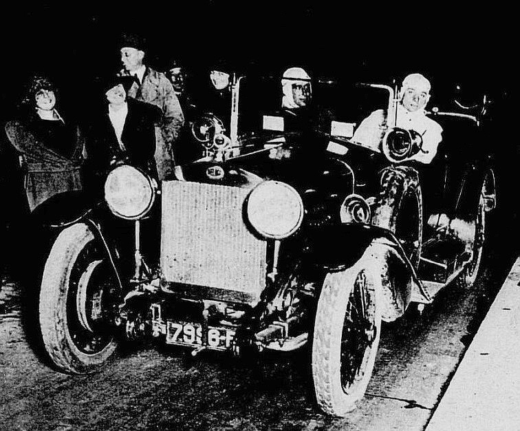 Maurice Béquet, recordman du trajet Paris-Madrid en 1922, sur Delage 11HP Le Monde illustré du 9 septembre 1922, p.224